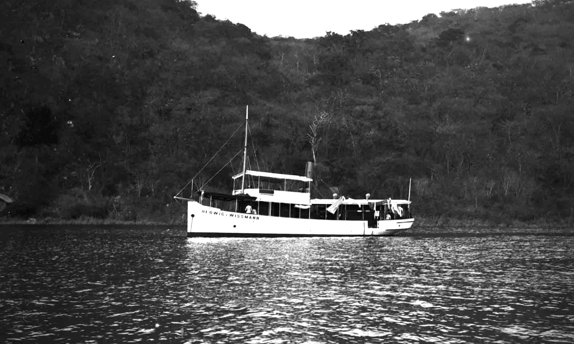 deutsches Postschiff Hedwig von Wissmann auf dem Tanganjikasee (Deutsch-Ostafrika)